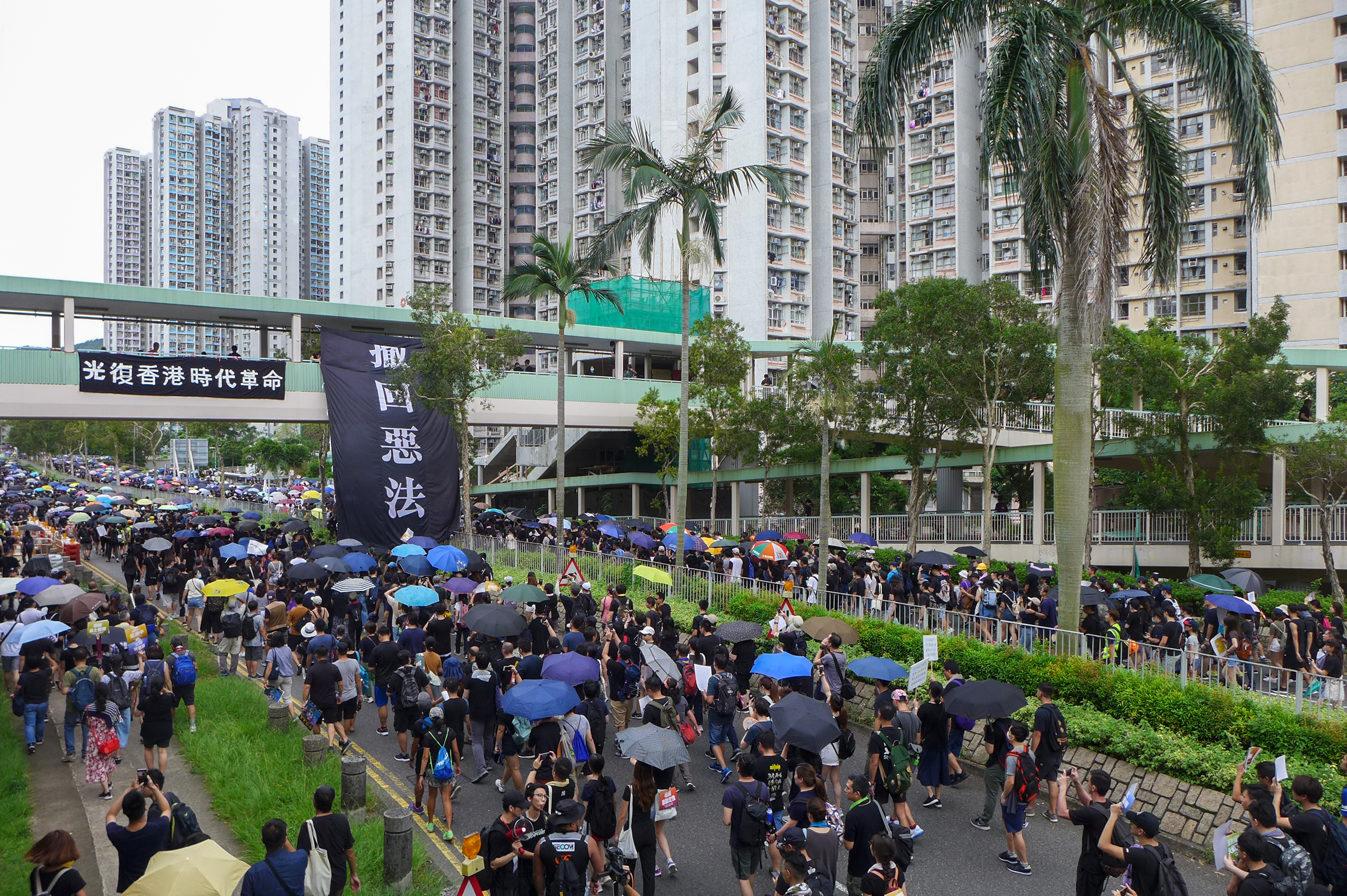 Protesters in Hang Hau